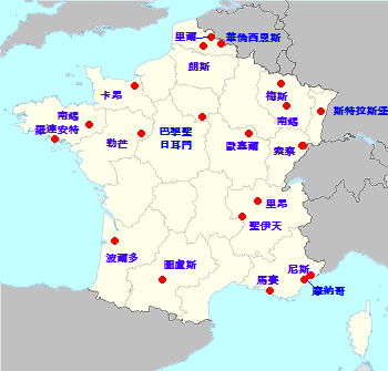 中文（台灣）: 2007-08年法甲分布